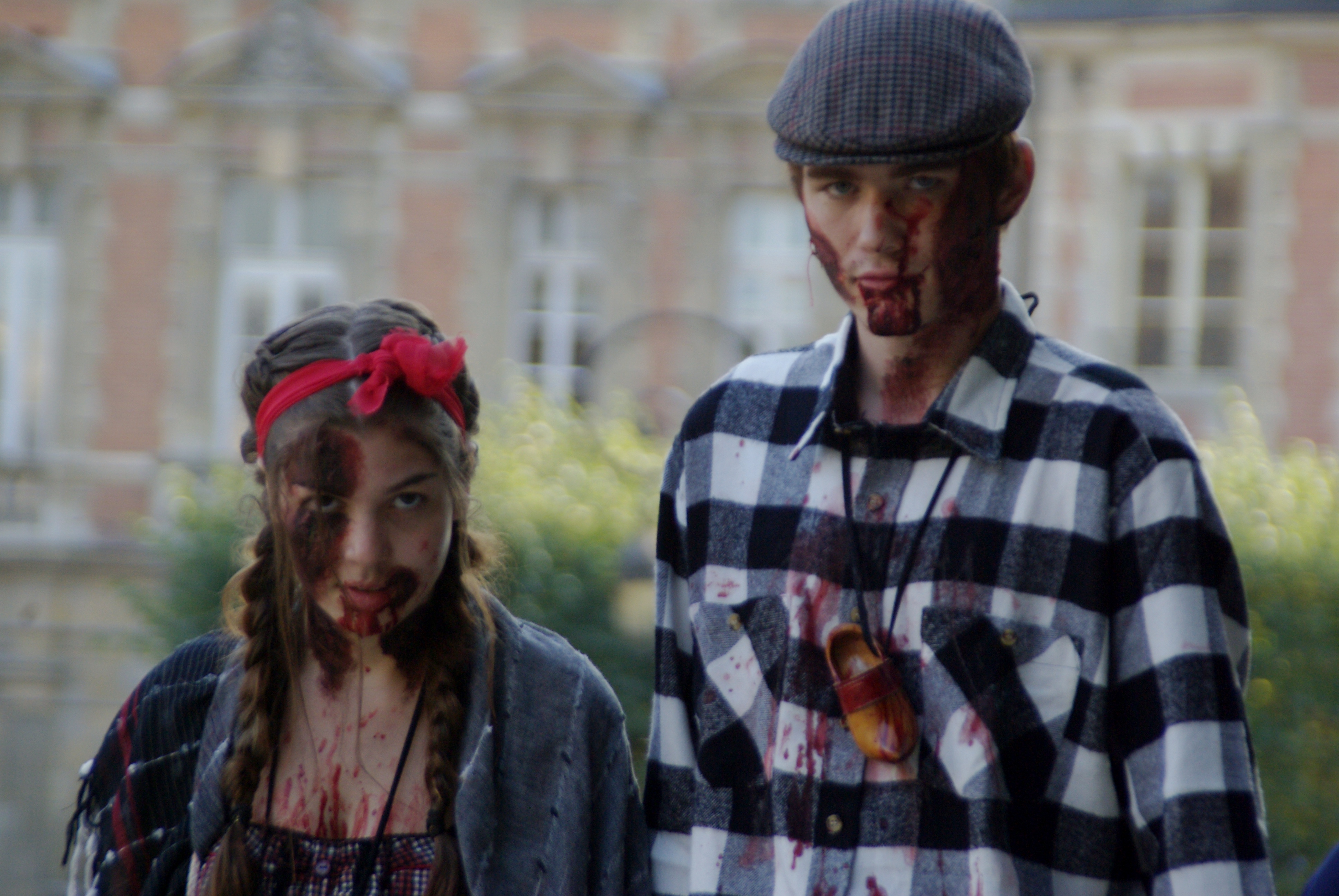 Zombies en la Plaza de los Vosgos, Les Marais, París